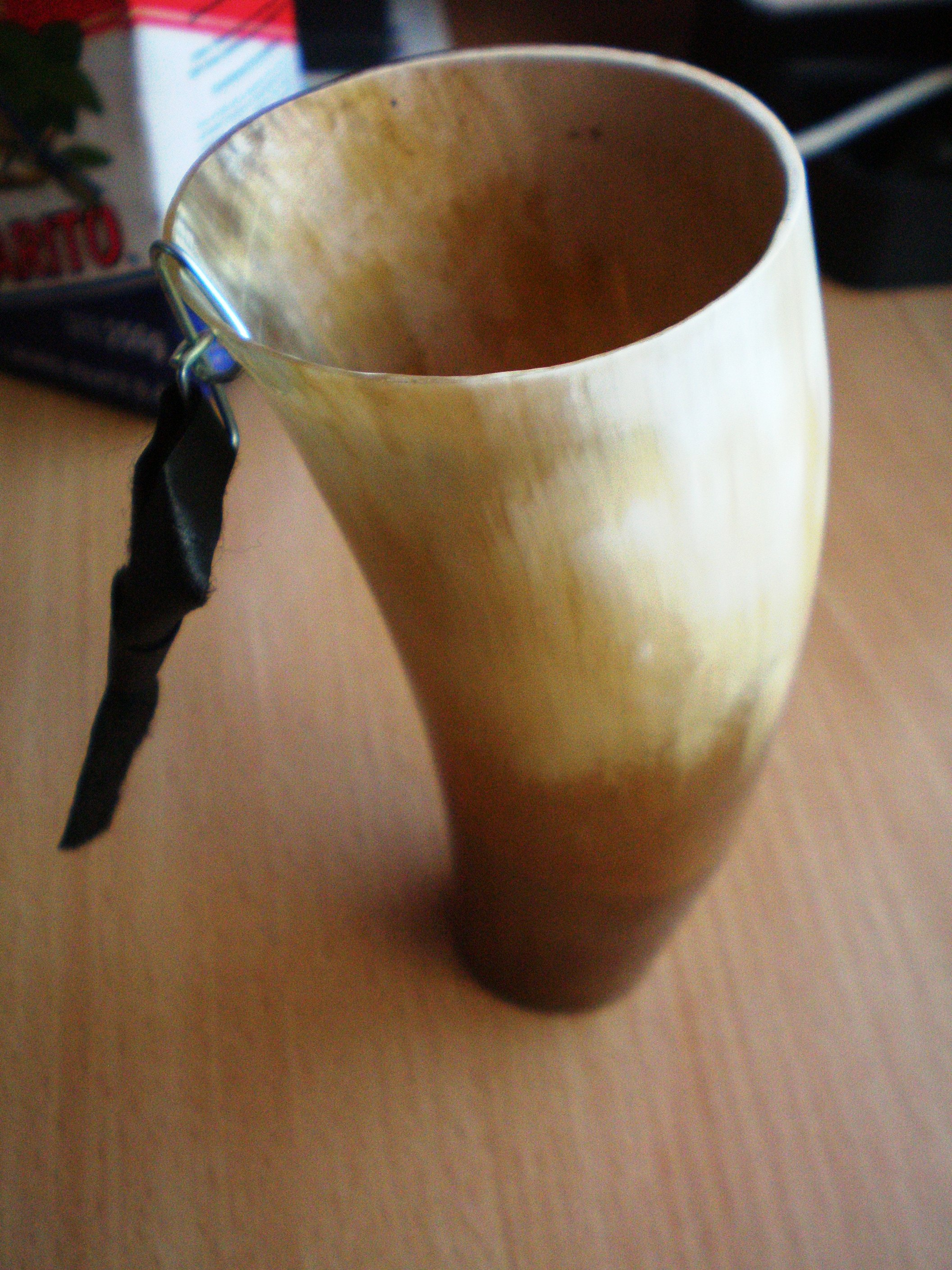 Guampa de Paraguay